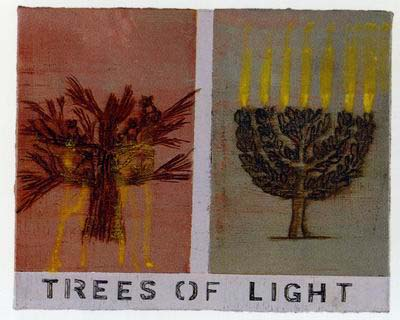 Painting